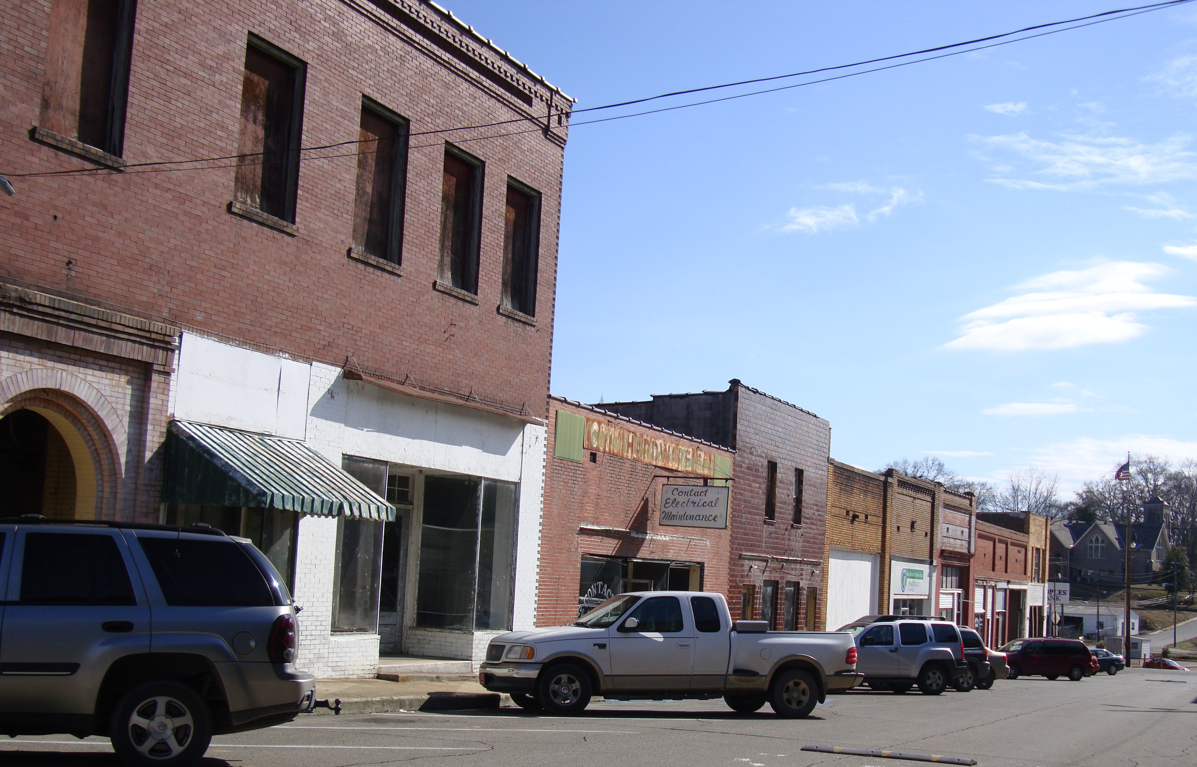 Cordova, Alabama.